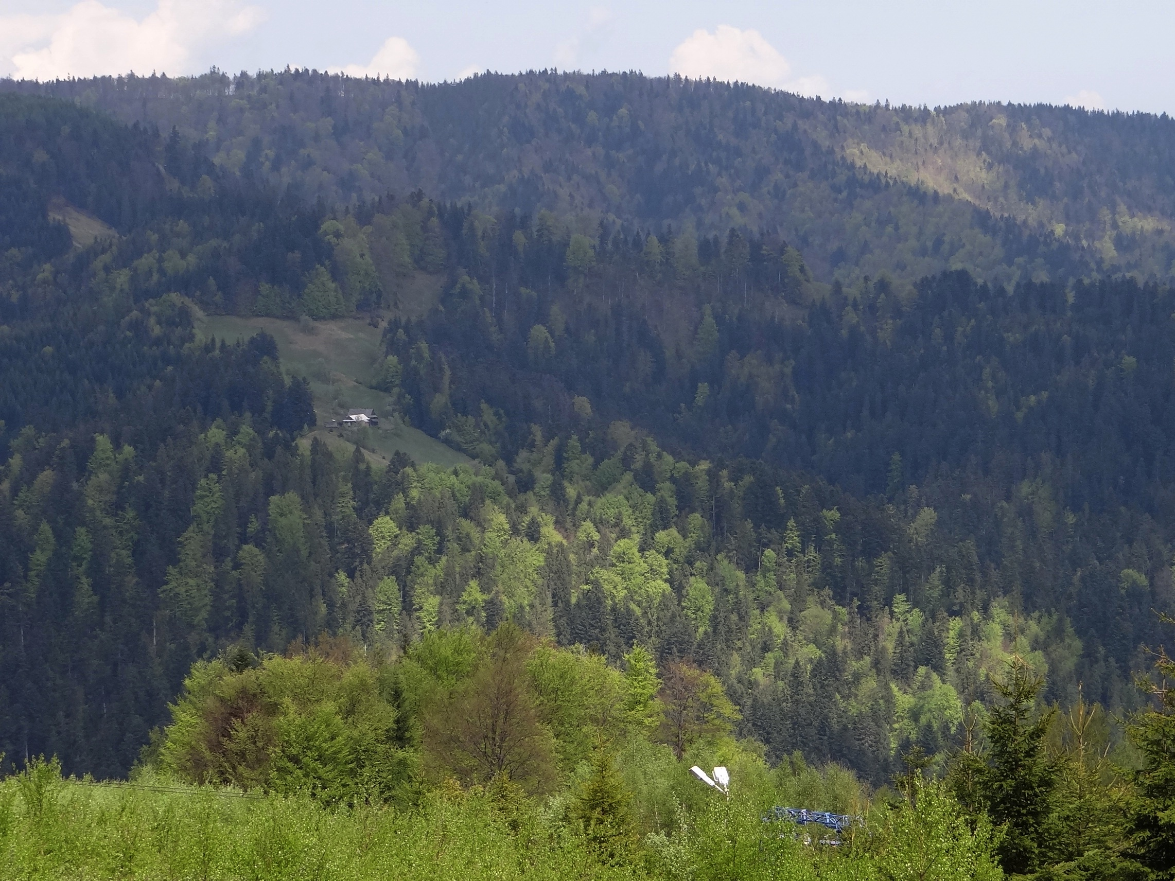 Sucha Dolina i Polana Czerteż w Piwnicznej-Zdroju